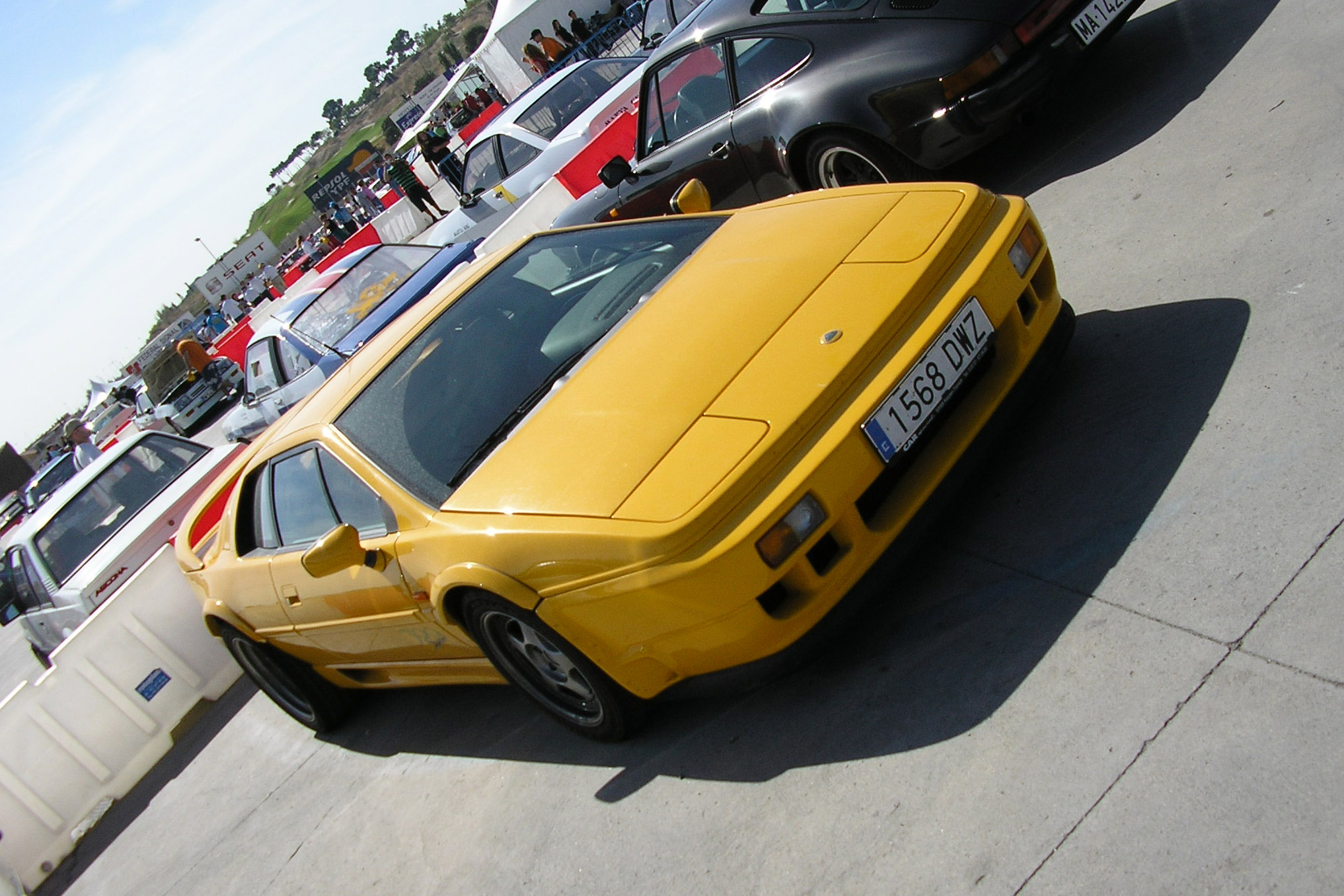 Lotus Spirit shown in Circuito del Jarama (Madrid). Jornada de puertas abiertas 2006.